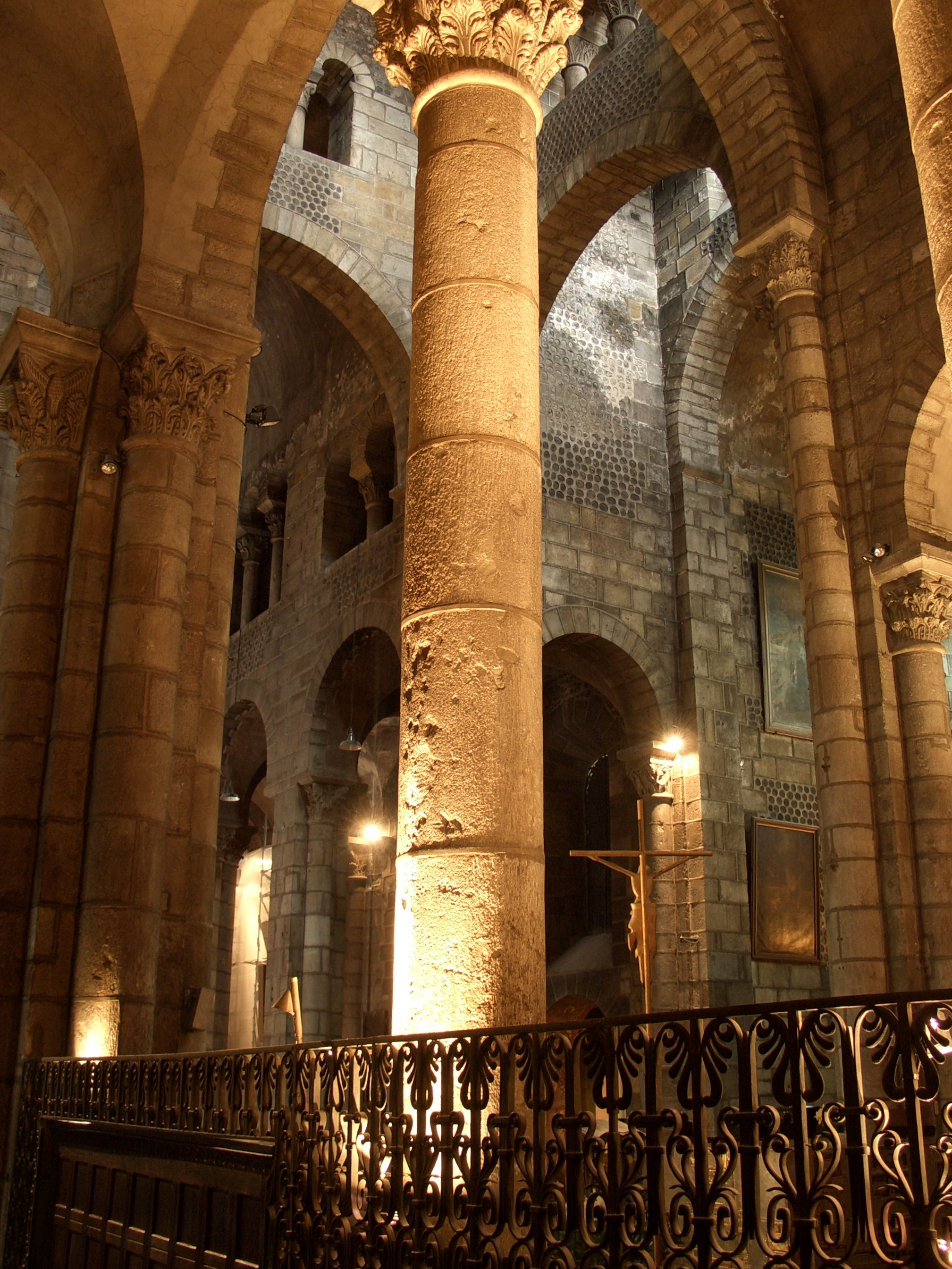 Clermont-Ferrand - Basílica de Nostra Senyora del Port